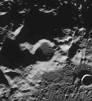 埃皮努斯环形山照片